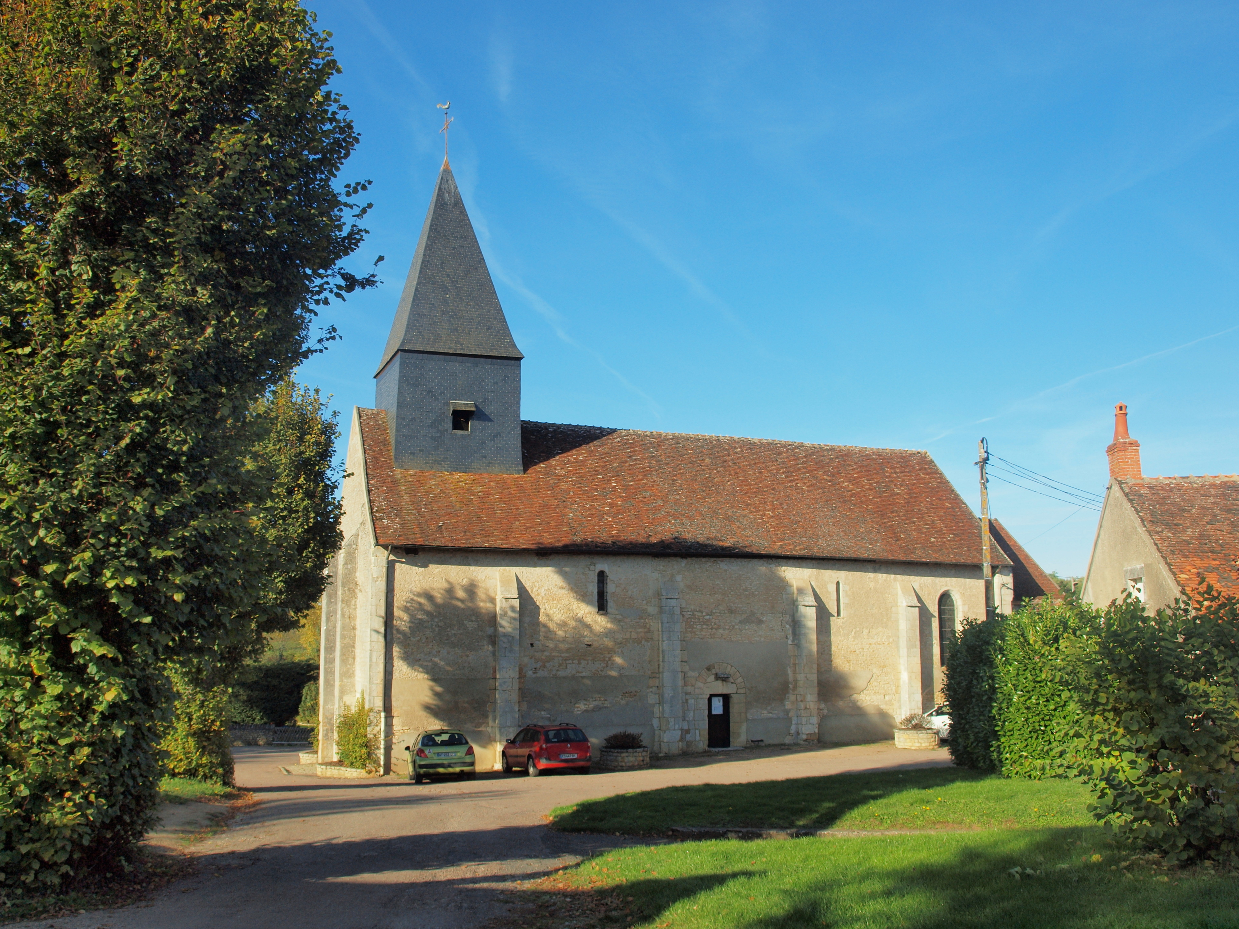 Narcy (Nièvre, France)